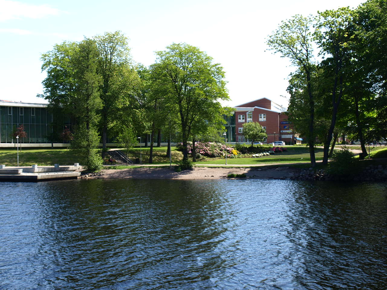 Vy över Kapsylparken i Halmstad./ Wiew over Kapsylparken in Halmstad,Sweden.